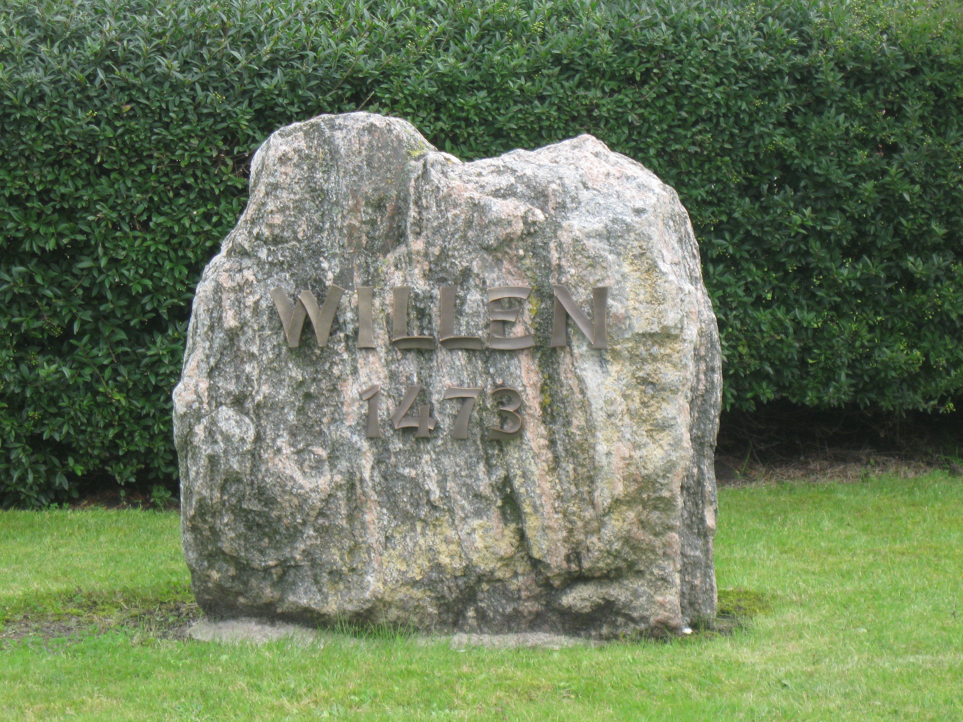 Der Willenstein